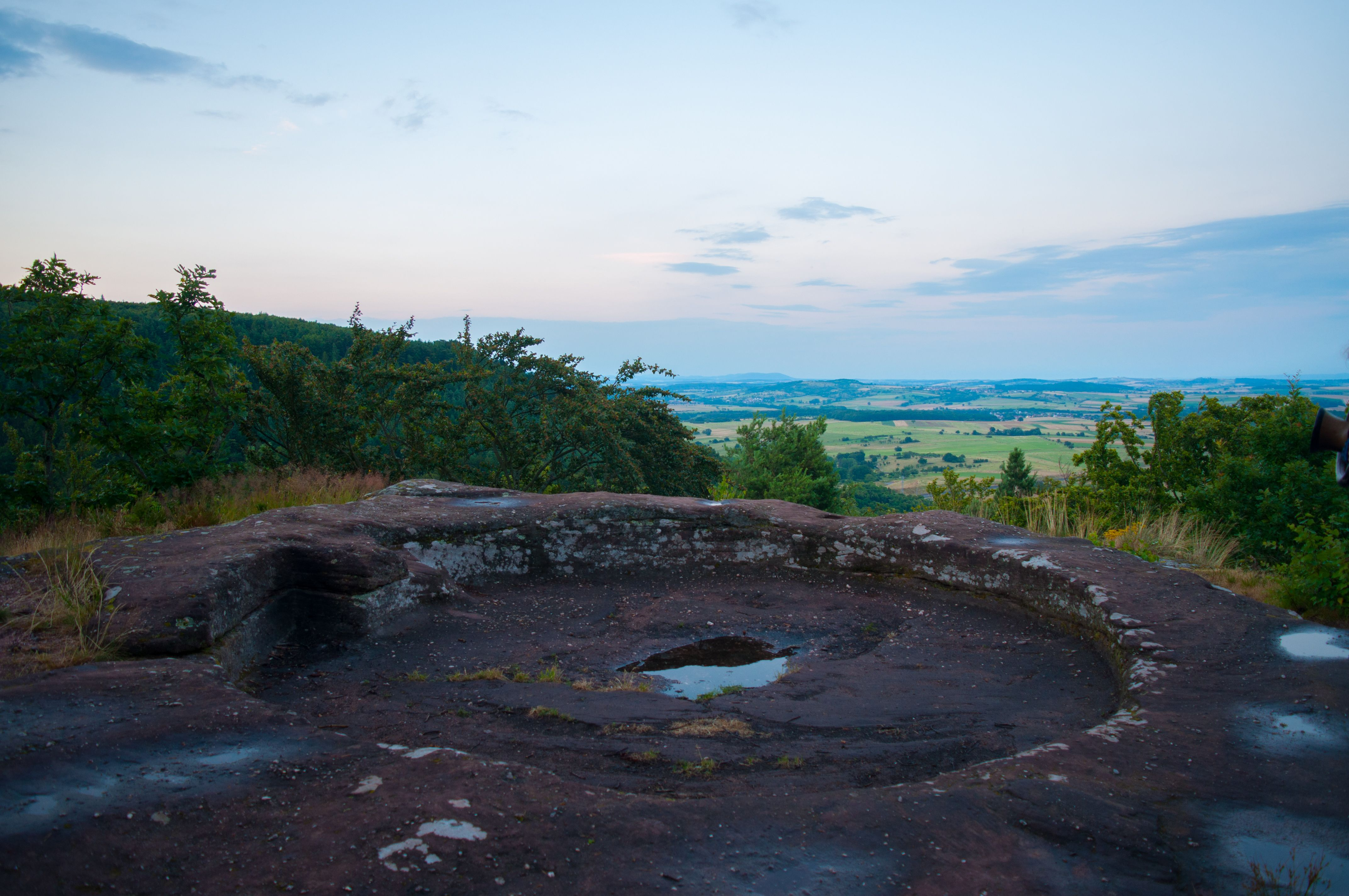 Rond des sorcières ou Hexenkreis